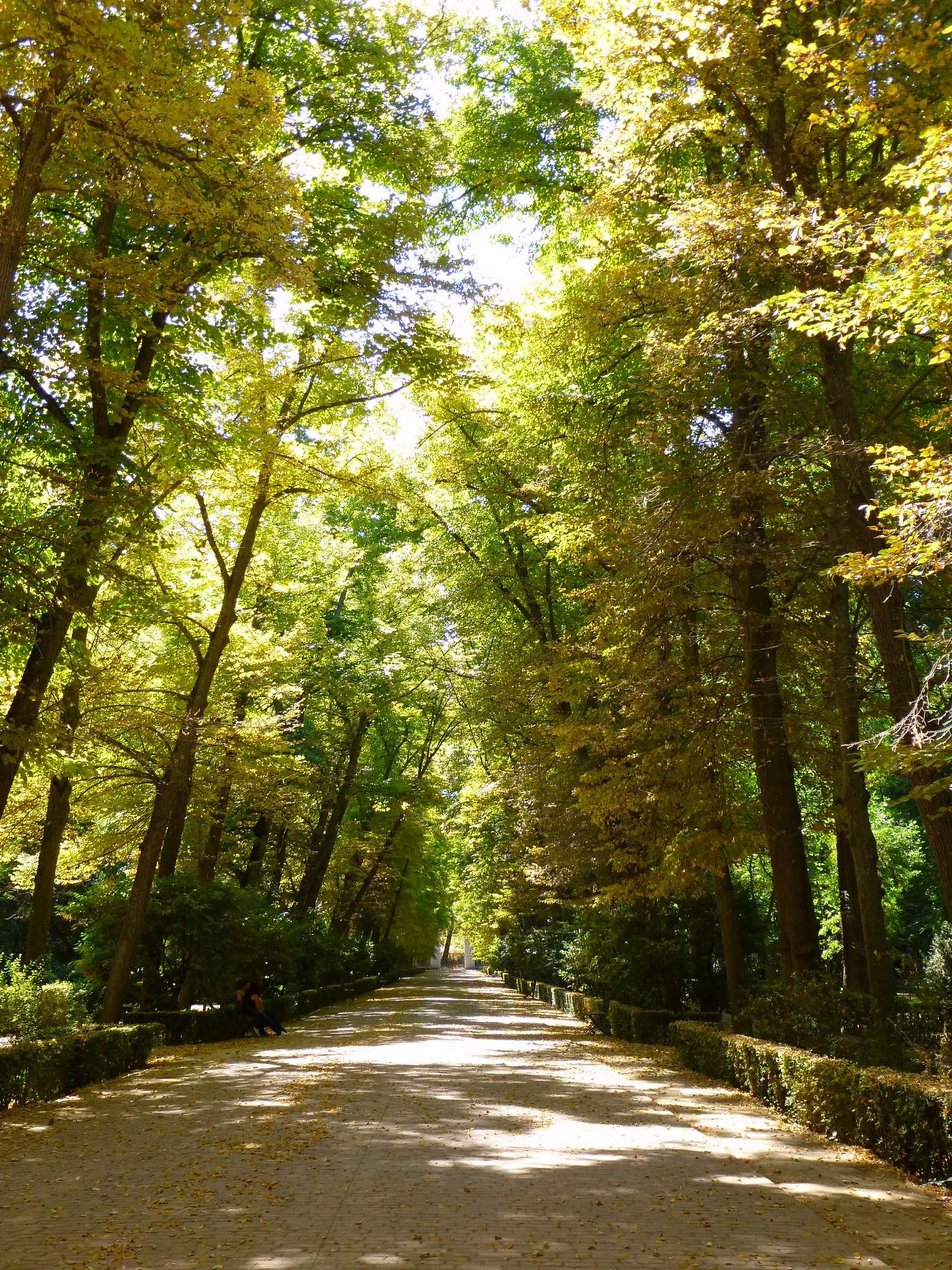 Jardín del Príncipe, Real Sitio de Aranjuez